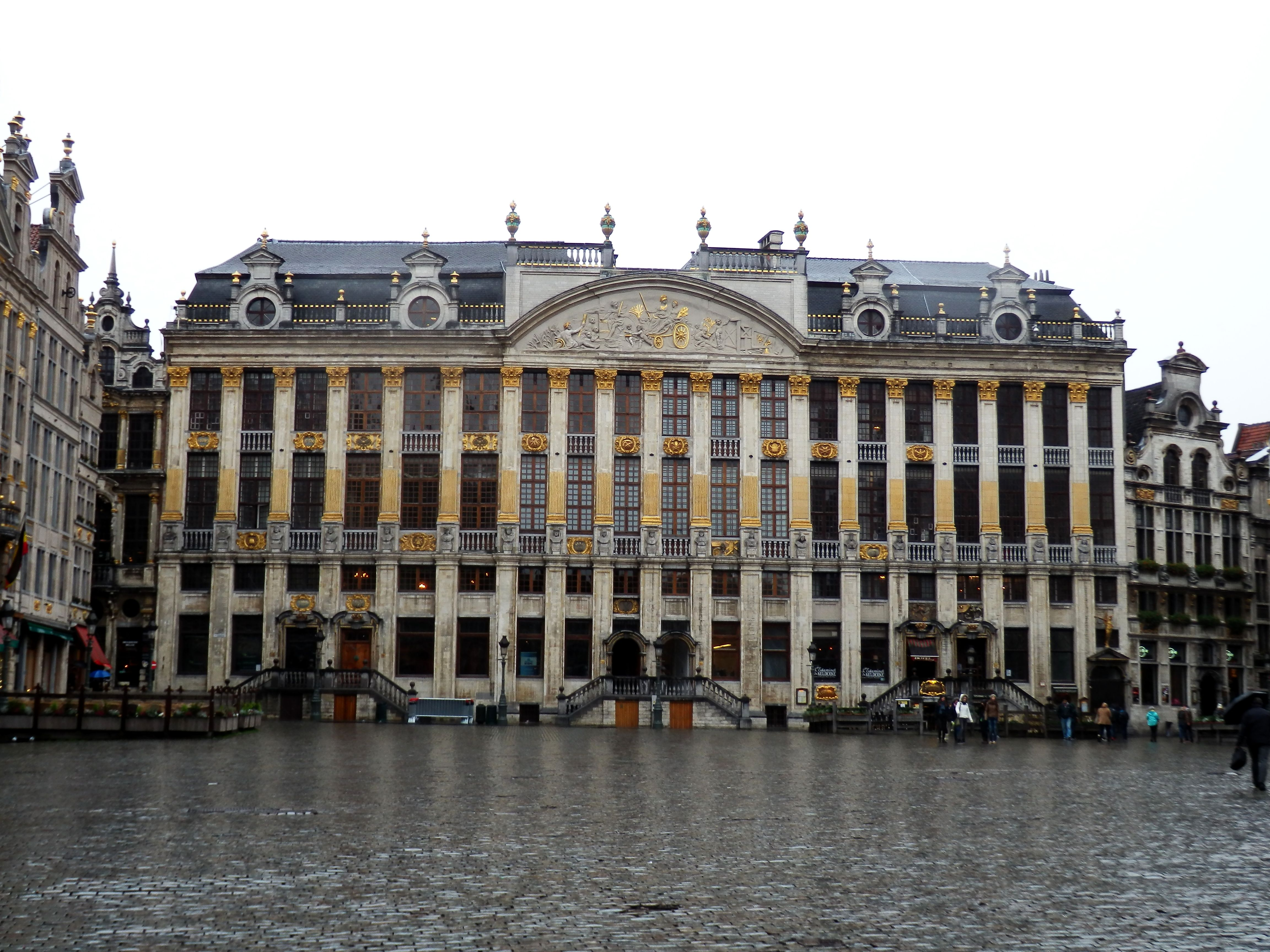 Dům na náměstí Grande Place v Bruselu